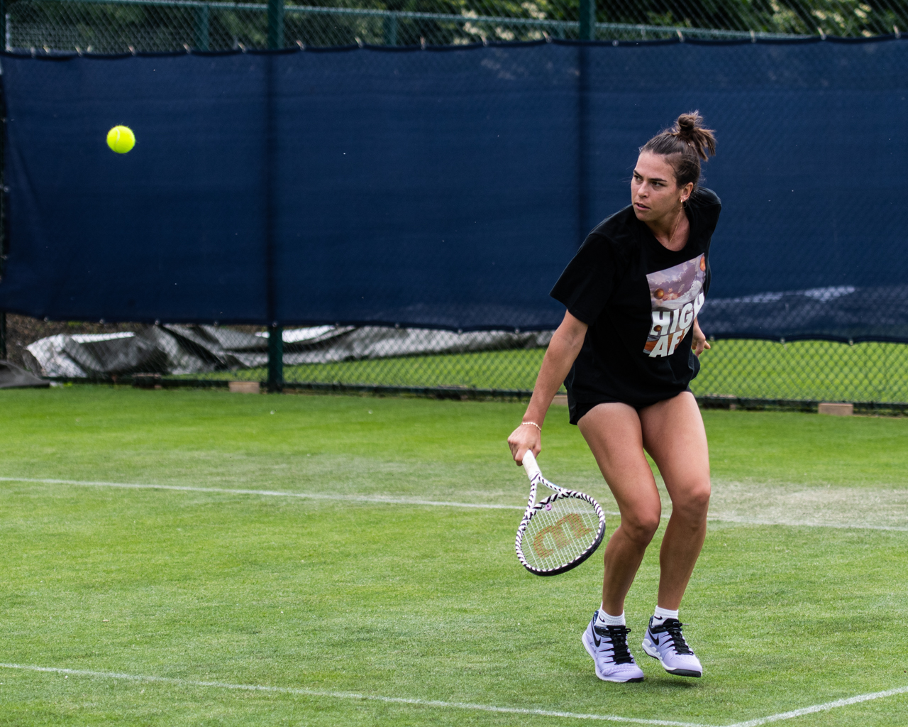 Ajla Tomljanovic